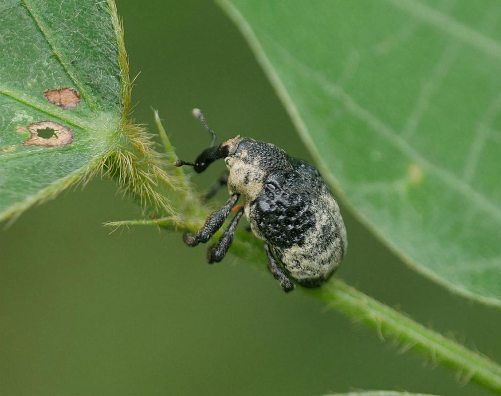 Mesalcidodes trifidus：オジロアシナガゾウムシ 2018/08/11 和歌山県田辺市：Tanabe City. Wakayama Pref. Japan